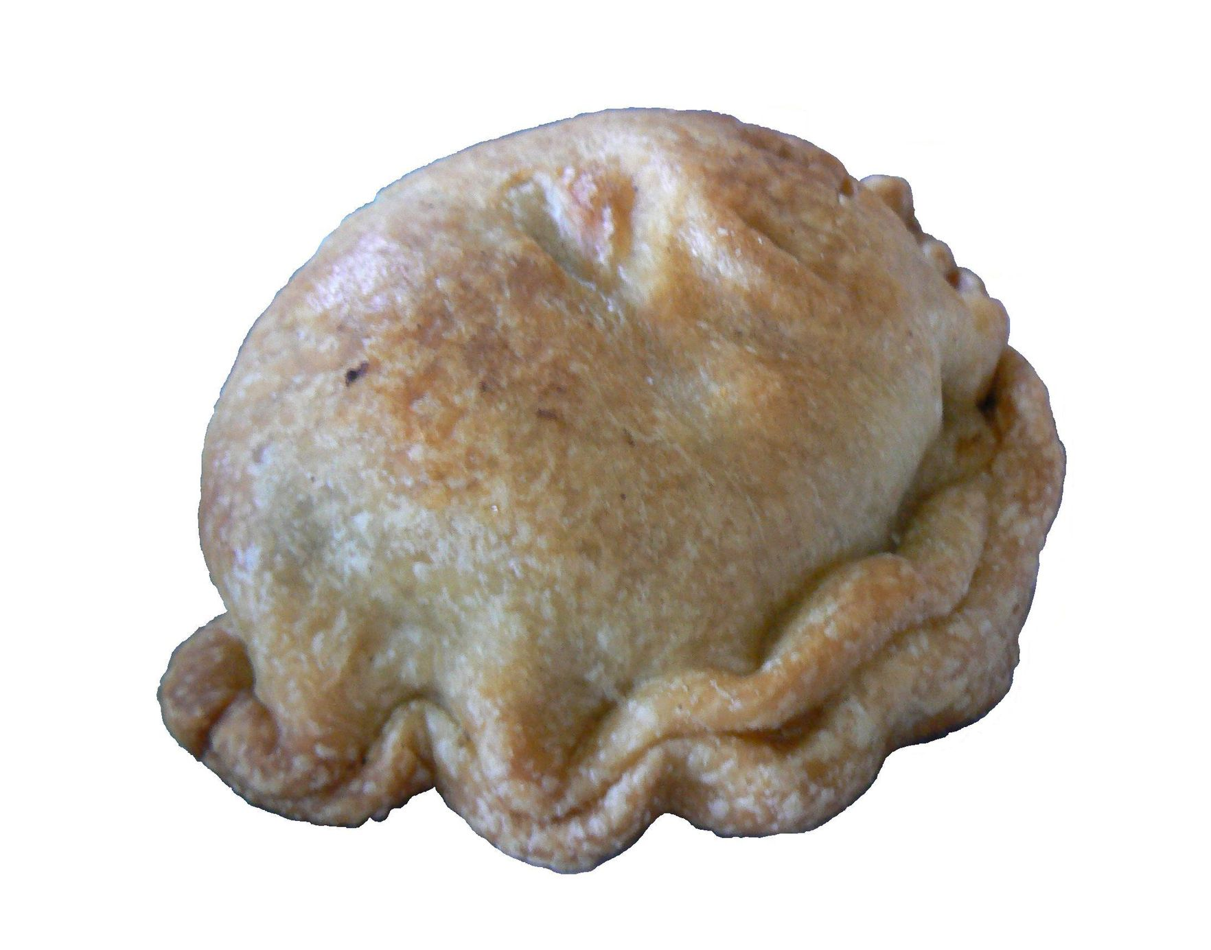 Rubiol farcit d'espinacs amb panses i pinyons, a Ferreries (Menorca).